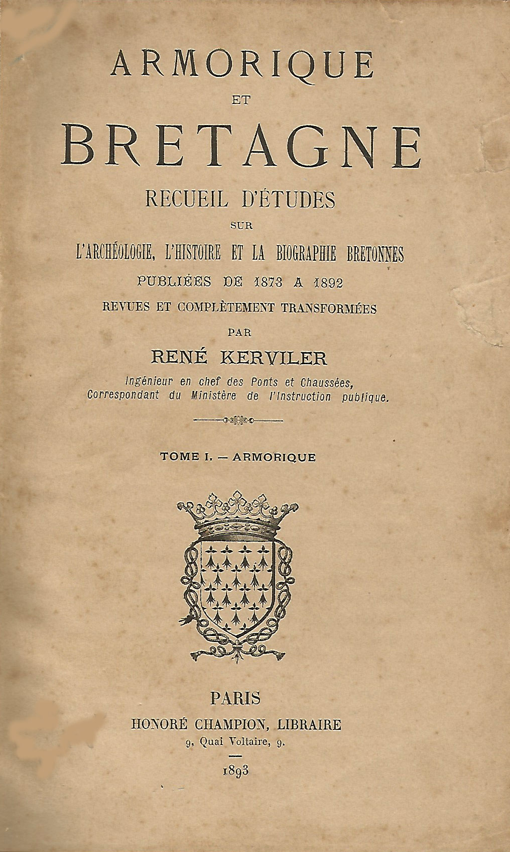 Reun Kerviler. Arvorig ha Breizh. Rann 1 Avorig. Pajenn titl